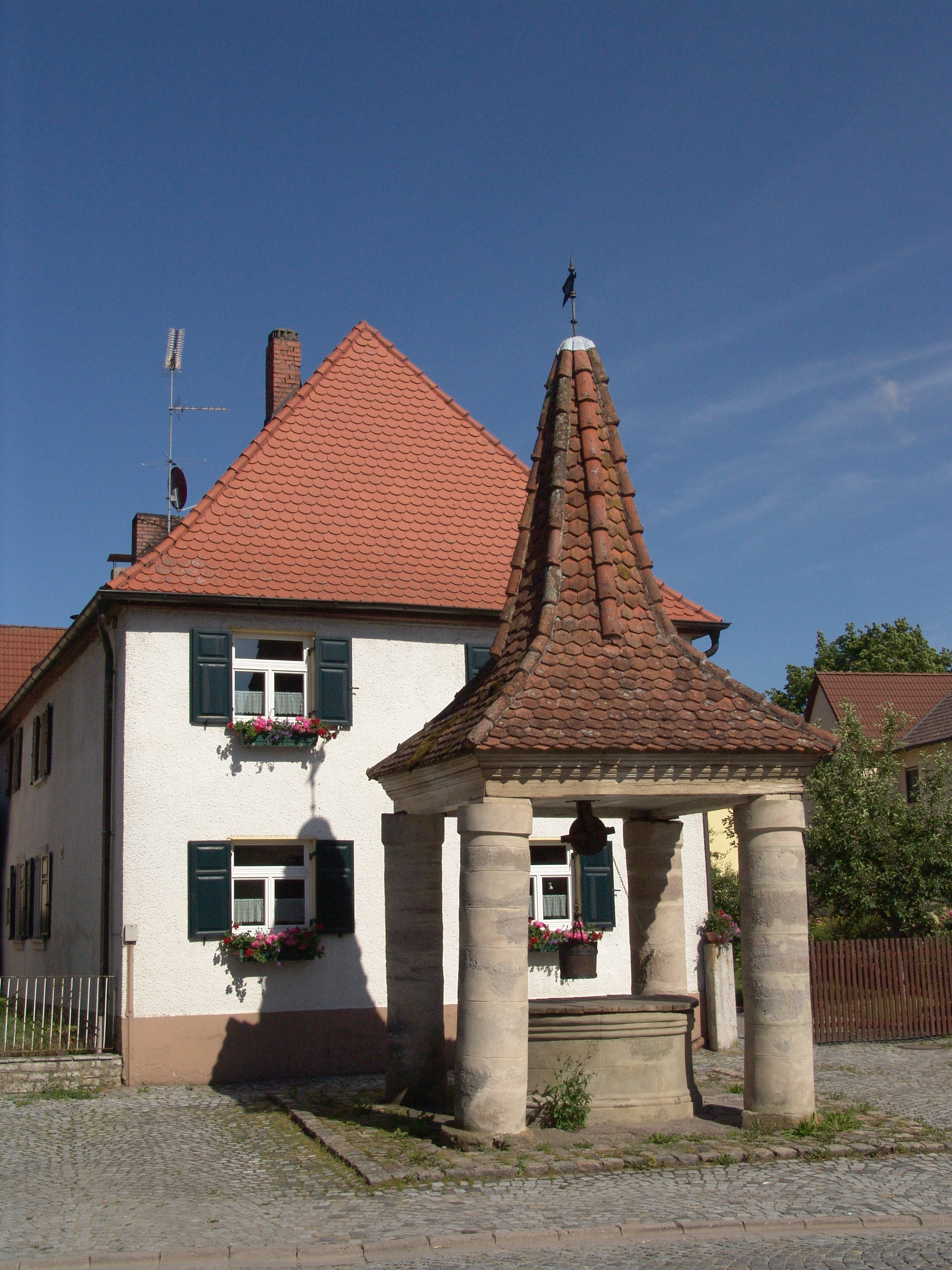 Baudenbach Brunnen